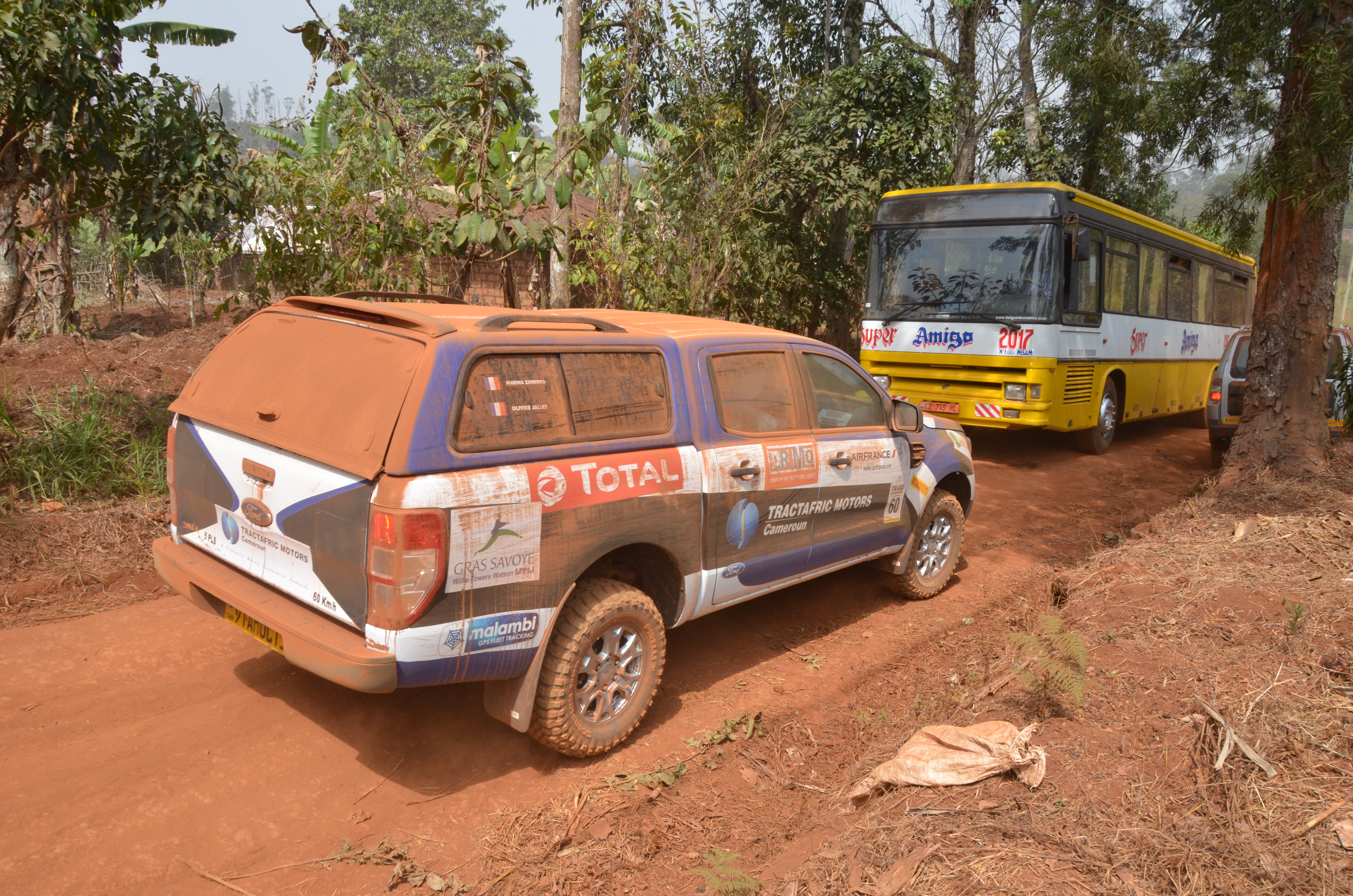 Véhicules arpentant une piste secondaire dans la ville de Bagangté This is an image with the theme "Africa on the Move or Transport" from: Cameroon